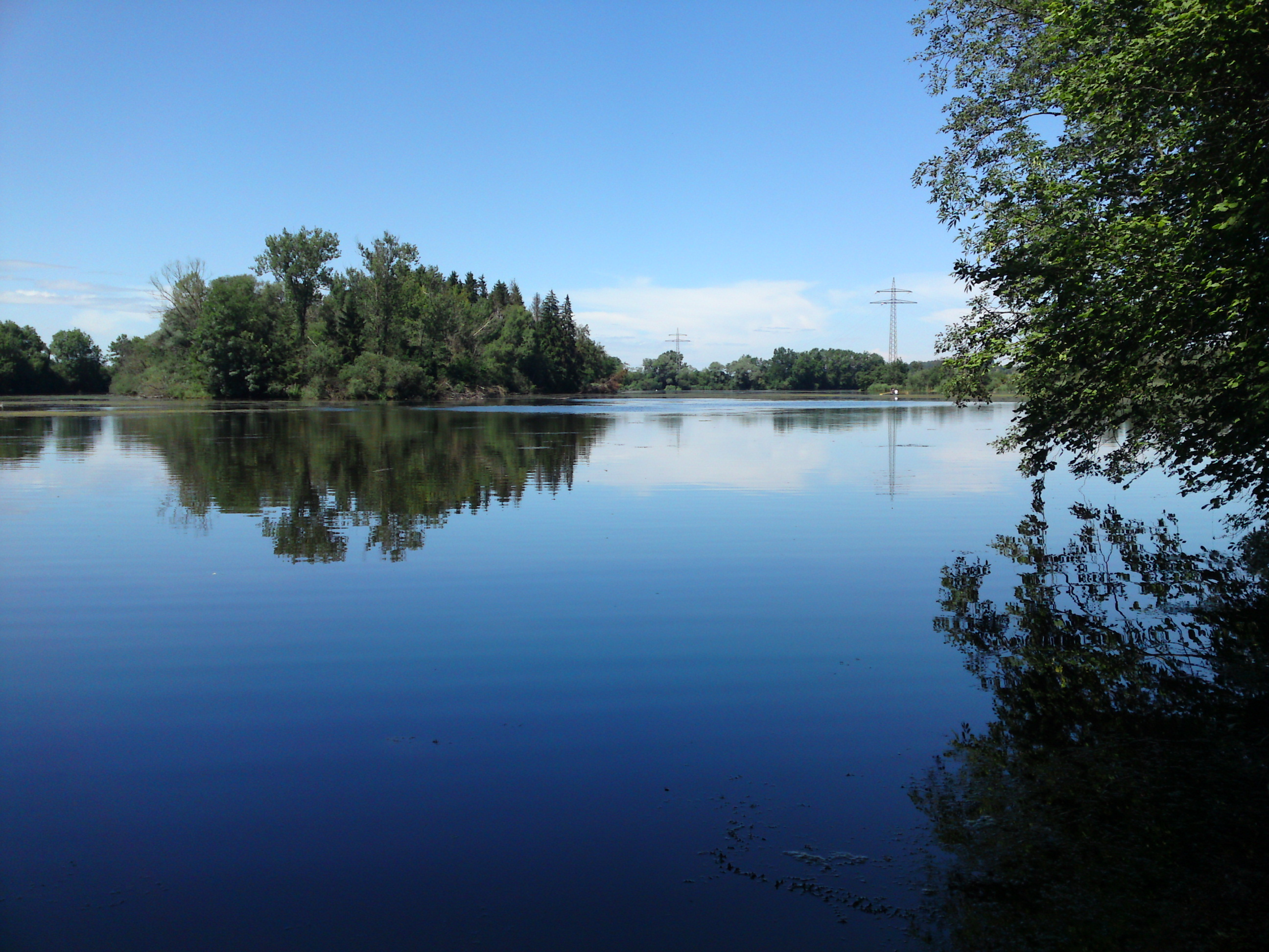 Bärensee